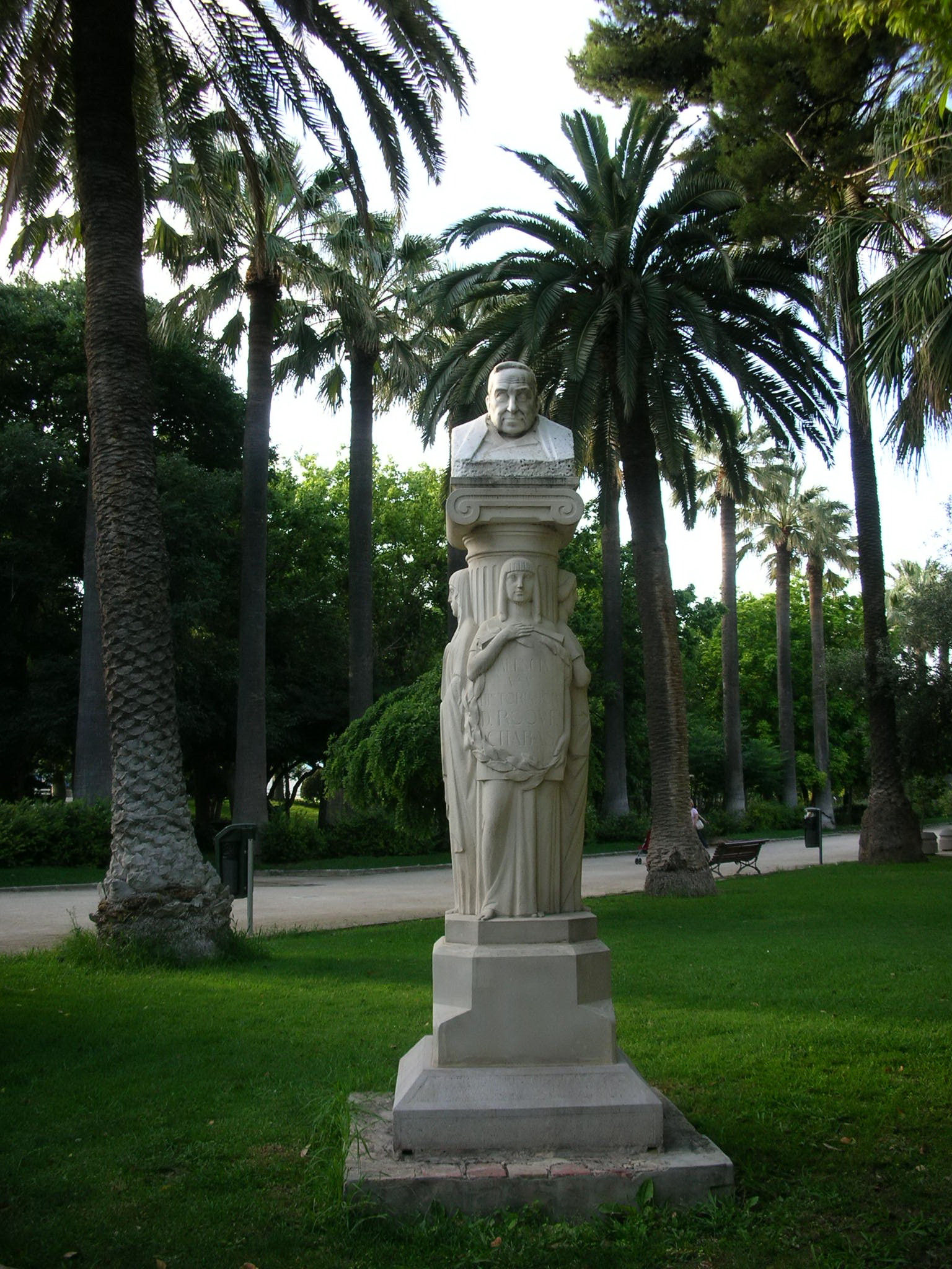 Bust de Roc Chabàs, Jardins del Real, València. En el pedestal, encerclada per la corona de llorer sostinguda per una cariàtide, la inscripció: "Valencia / a su / historiador / D. Roque / Chabás."